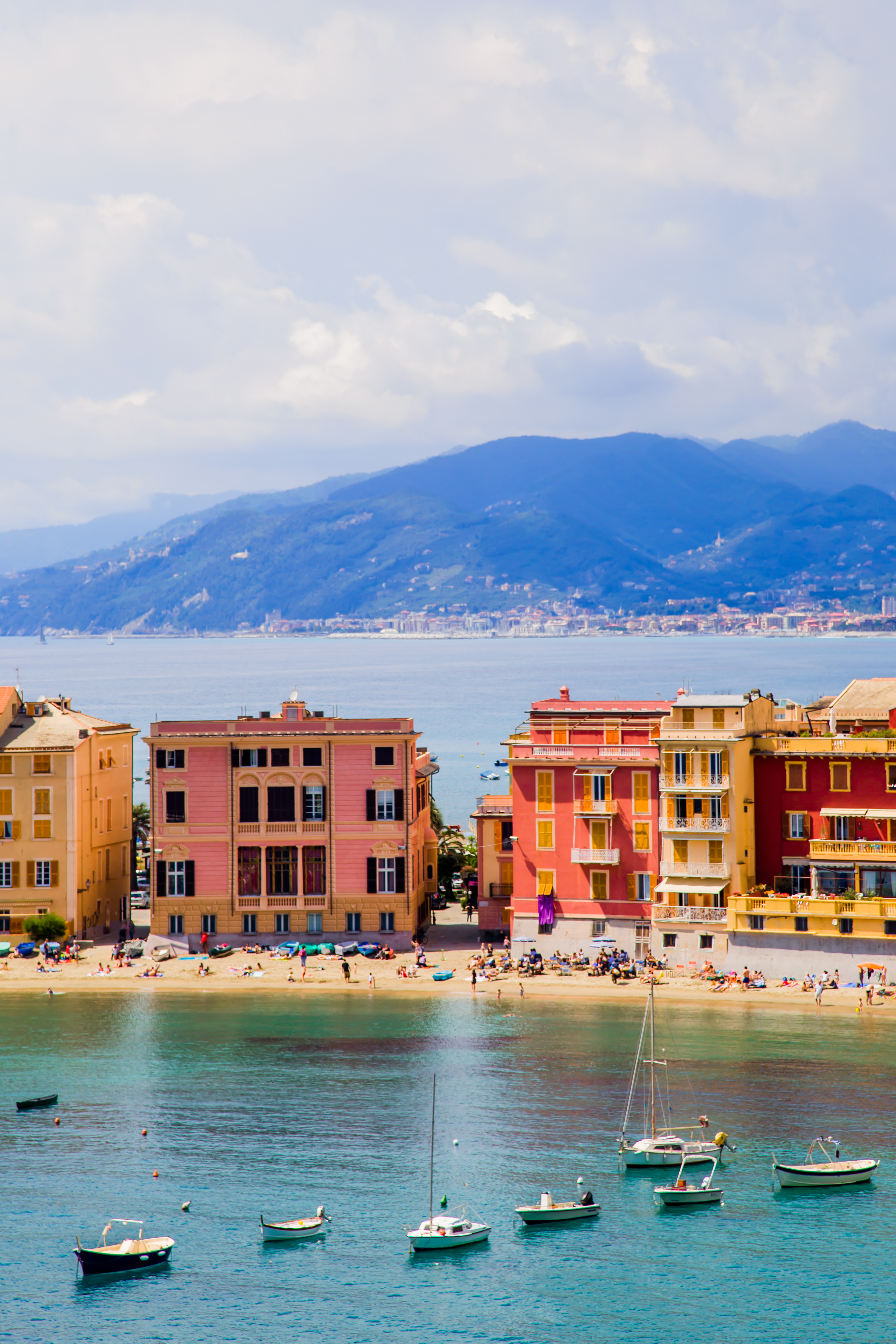 Scorcio della Baia del Silenzio - Sestri Levante